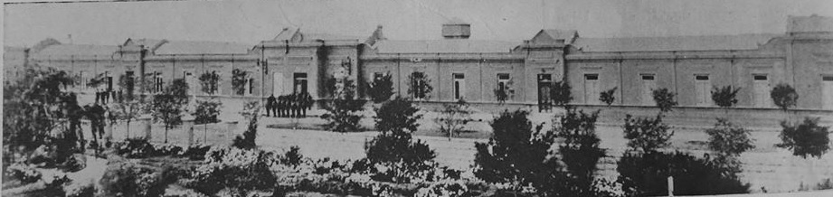 Sede de la Gobernacion del Territorio Nacional del Chubut en Rawson